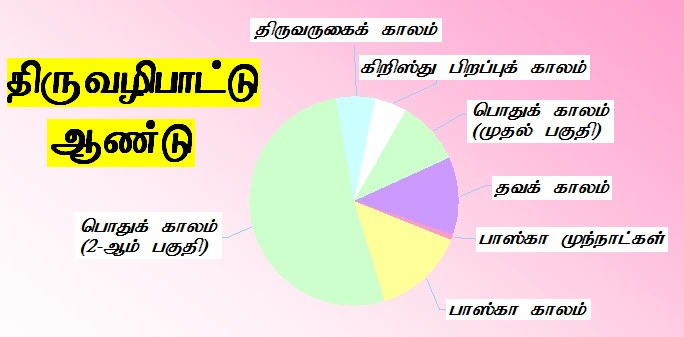 திருவழிபாட்டு ஆண்டு